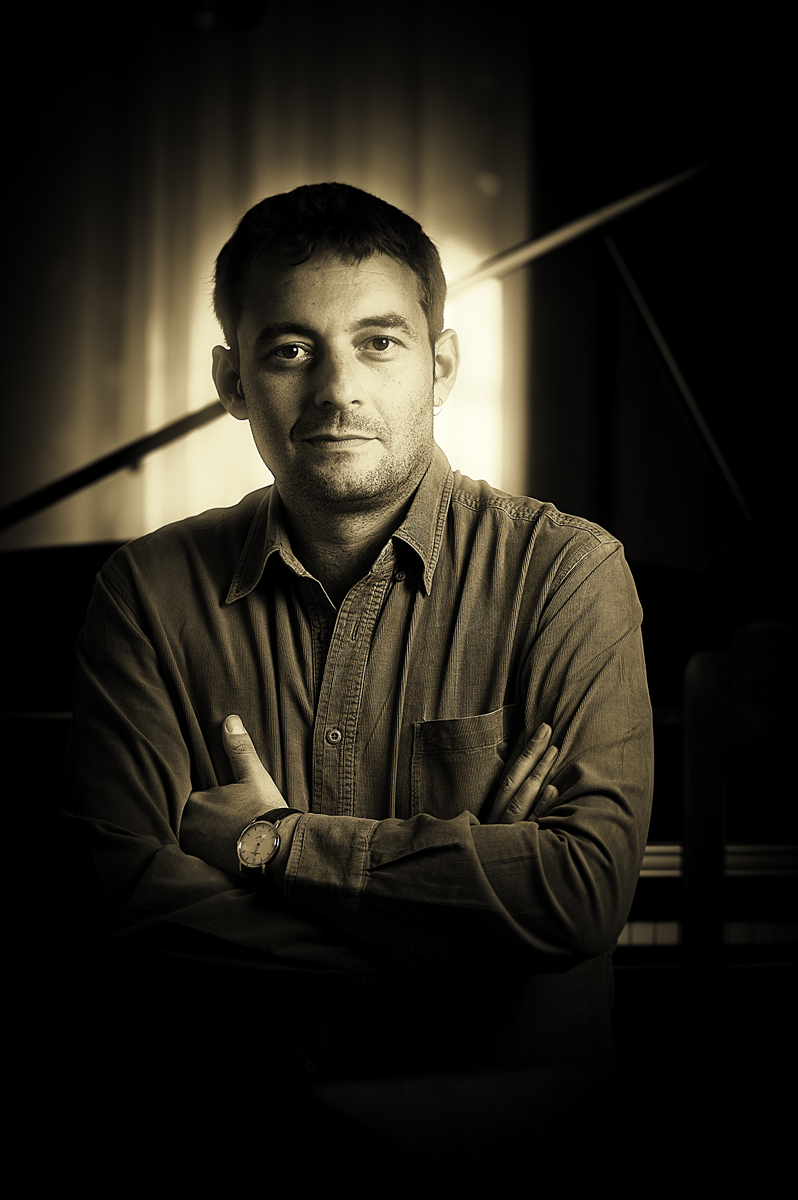 Petru Mărgineanu